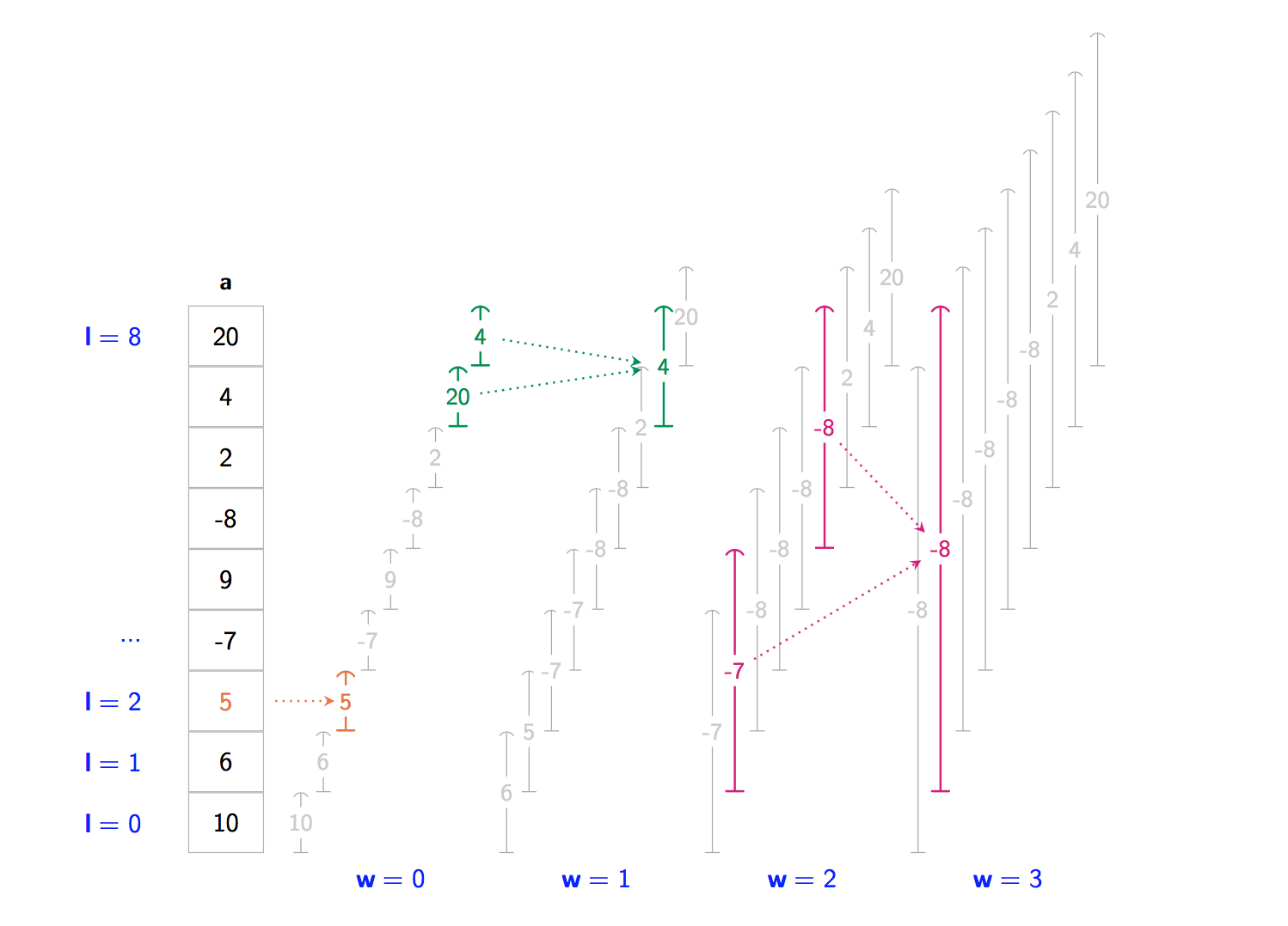 RMQ